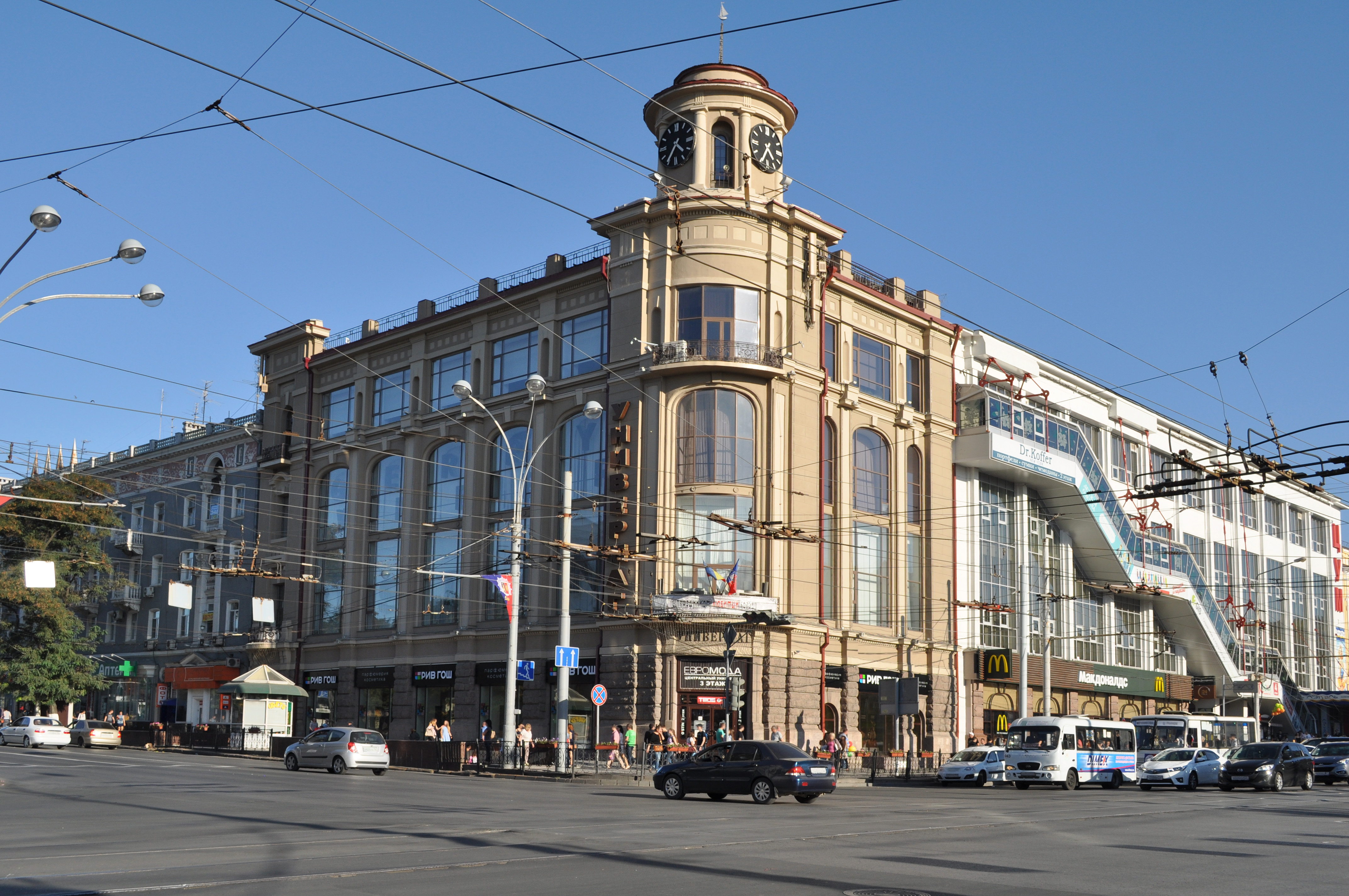 Доходный дом Г.Г. Пустовойтова: улица Большая Садовая, 46/30, проспект Буденновский/29,, Ростов-на-Дону, Ростовская область